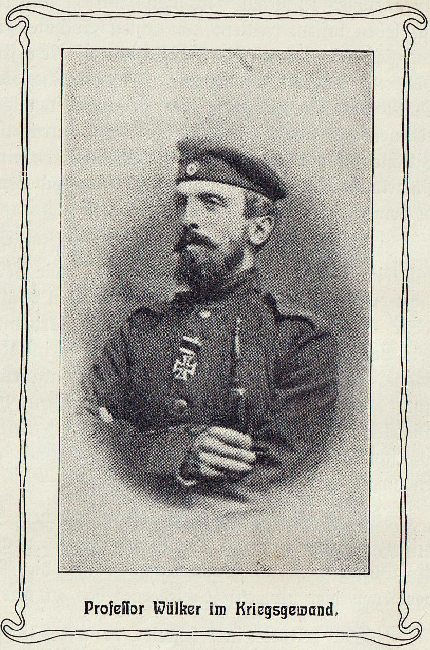 Professor Richard Wülker (1865-1910), Universität Leipzig, als Soldat, 1871